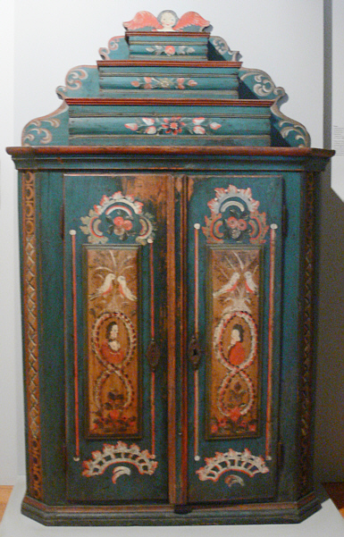 Tresur (wohl von „dressoir“ = Anrichte), Fichte bemalt, Hohenlohe, 1. Viertel 19. Jahrhundert Landesmuseum Württemberg (Außenstelle Museum für Volkskultur in Württemberg, Waldenbuch) 1.11, Inv. Nr. 1960/361